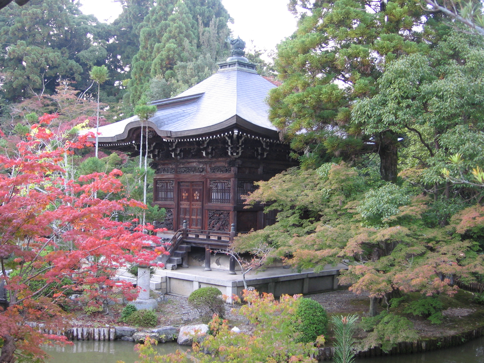 Photo prise au temple de Seiryo-Ji en automne. Au premier plan, un érable du Japon en plein "rougeoiment".